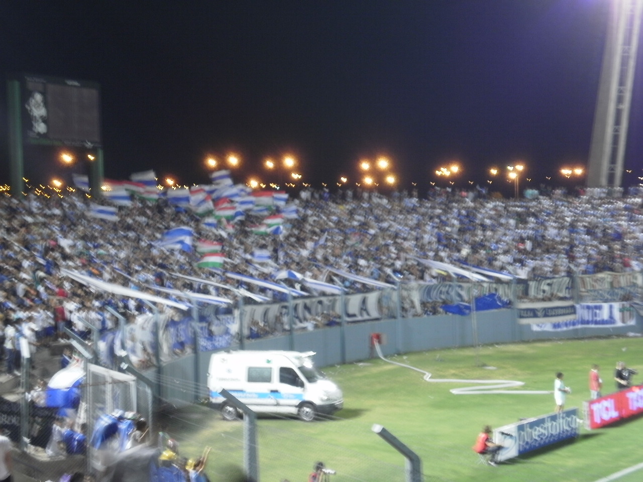 foto de velez en la punta